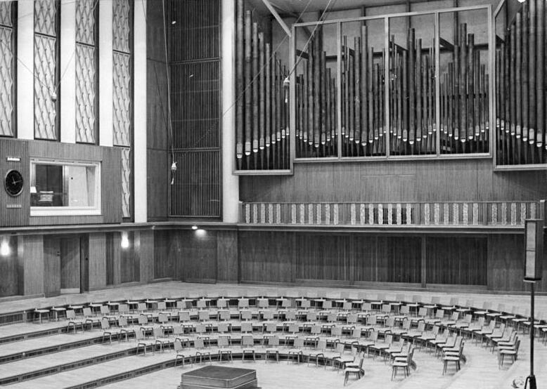 Zentralbild Sturm 8.2.56 Neuer moderner Komplex für die künstlerische Produktion im Funkhaus Berlin Der am 16. Februar 1955 durch Brandstiftung zerstörte große Sendesaal des Staatlichen Rundfunkkomitees Berlin, Nalepastrasse, ist nach modernsten Gesichtspunkten wiederaufgebaut worden. Daneben wurden einige kleinere Sendesäle eingerichtet. Zu jedem Sendesaal gehört ein Regieraum. Am 8.2.56 fand im Funkhaus eine Pressekonferenz statt mit anschliessender Besichtigung der neuen Räume durch die Pressevertreter. UBz: Der große Sendesaal des Funkhauses, der für große Orchester, gegebenenfalls mit Chor und Orgel, bestimmt ist. Sein Volumen beträgt ca 12.000 m³ (eins zwei null null null)